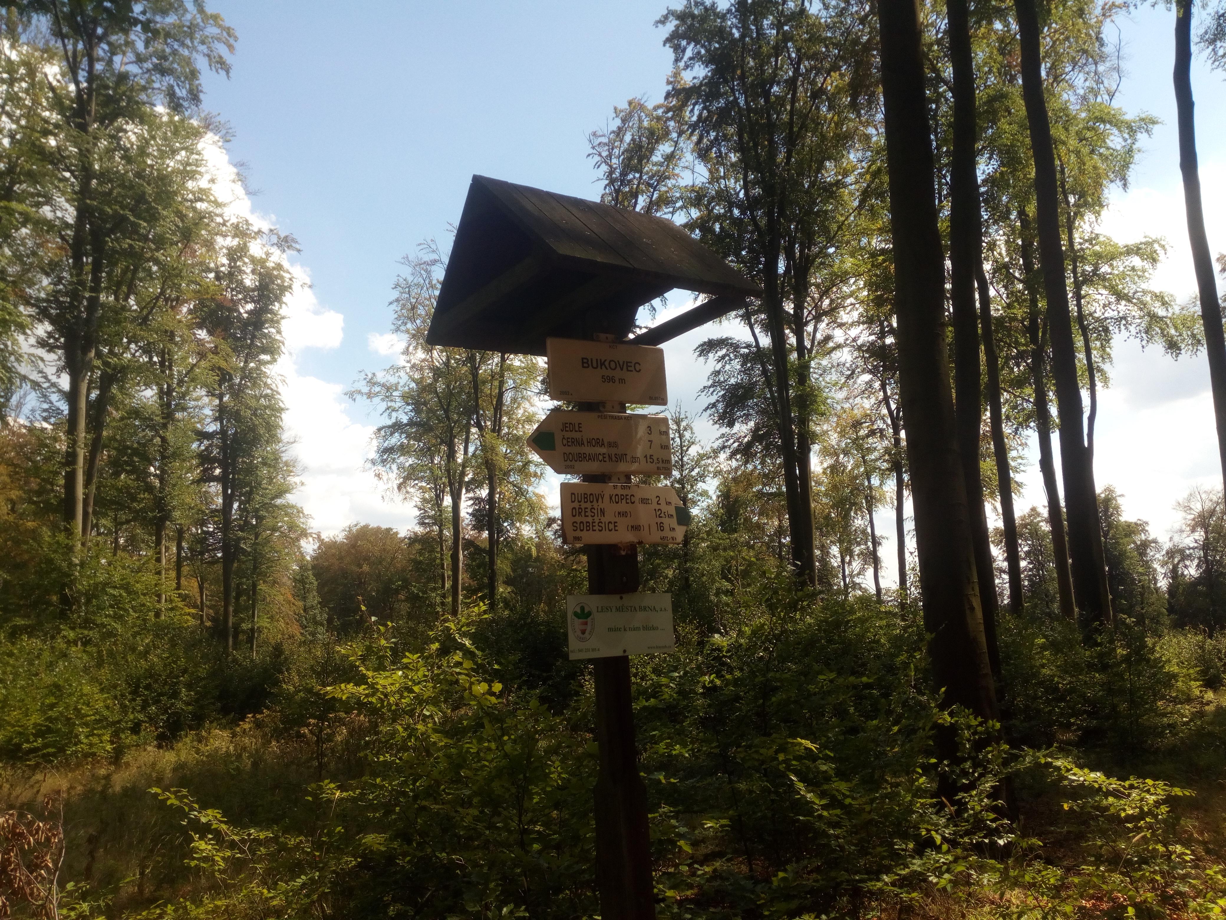 Výškový bod v drahanske vrchovine u blanska